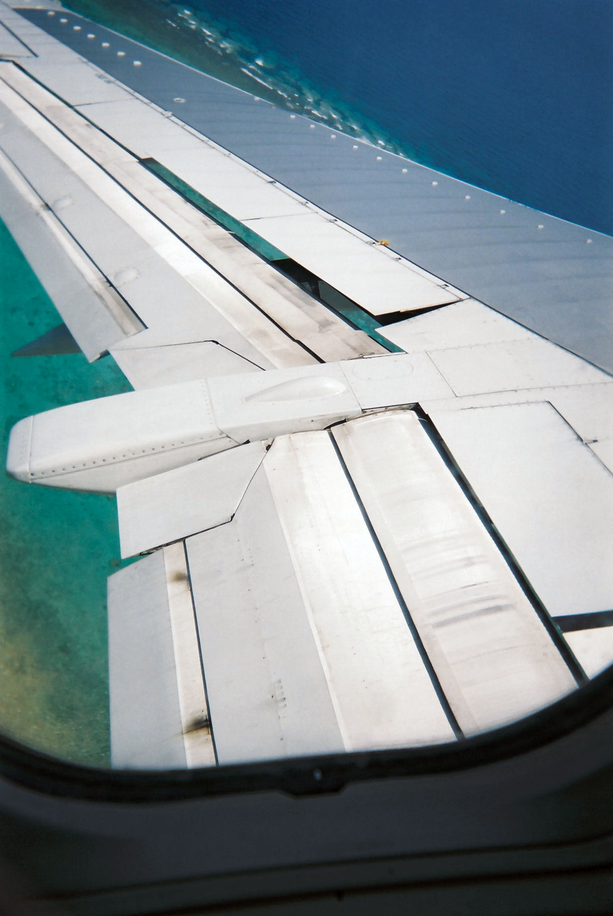 Spoiler. Boeing 737.